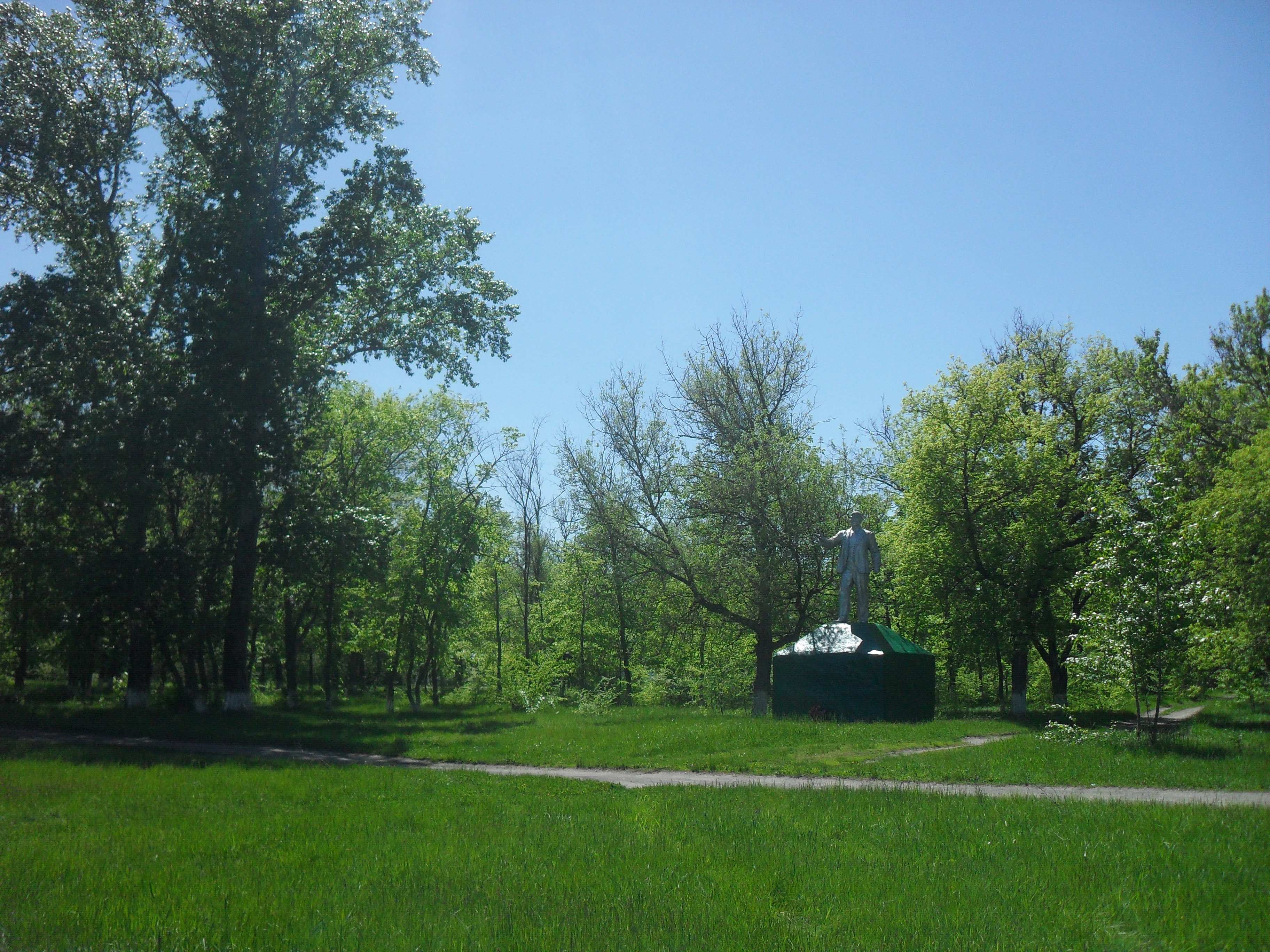 Памятник В.И.Ленину в Центральном парке села Шапкино Тамбовской области.